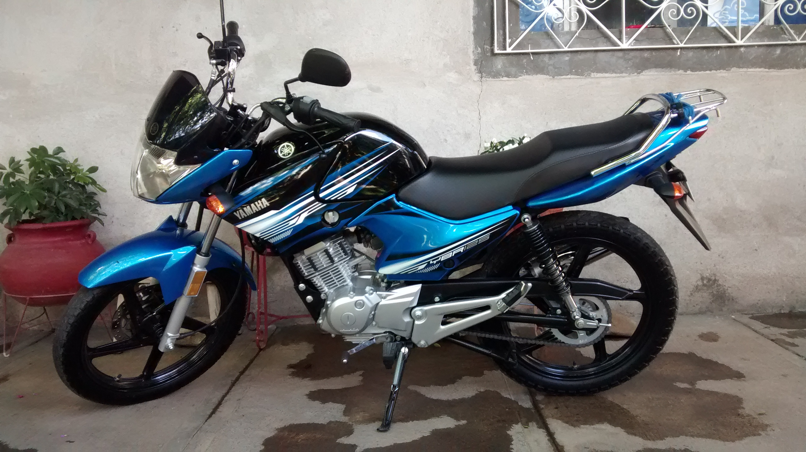 Yamaha YBR 125 ESD MEXICO